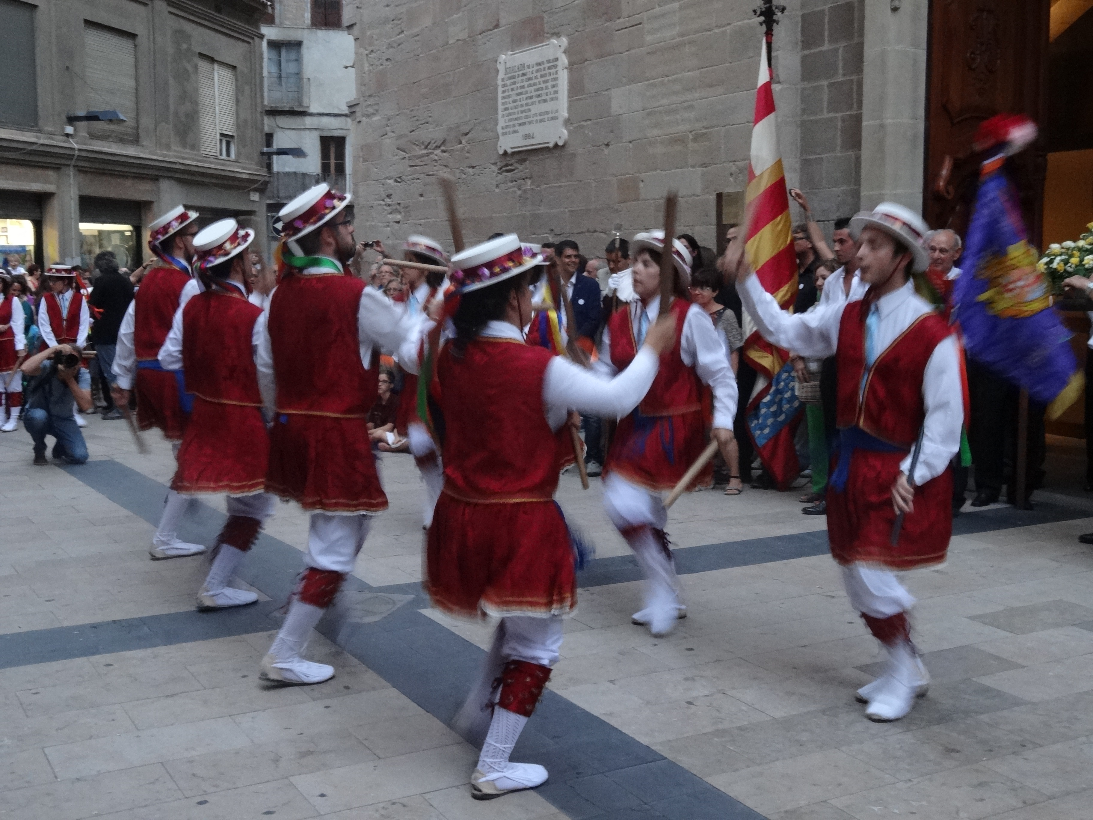 Festa Major d'Igualada 2013. Processó de Sant Bartomeu. Ball de Bastons d'Igualada